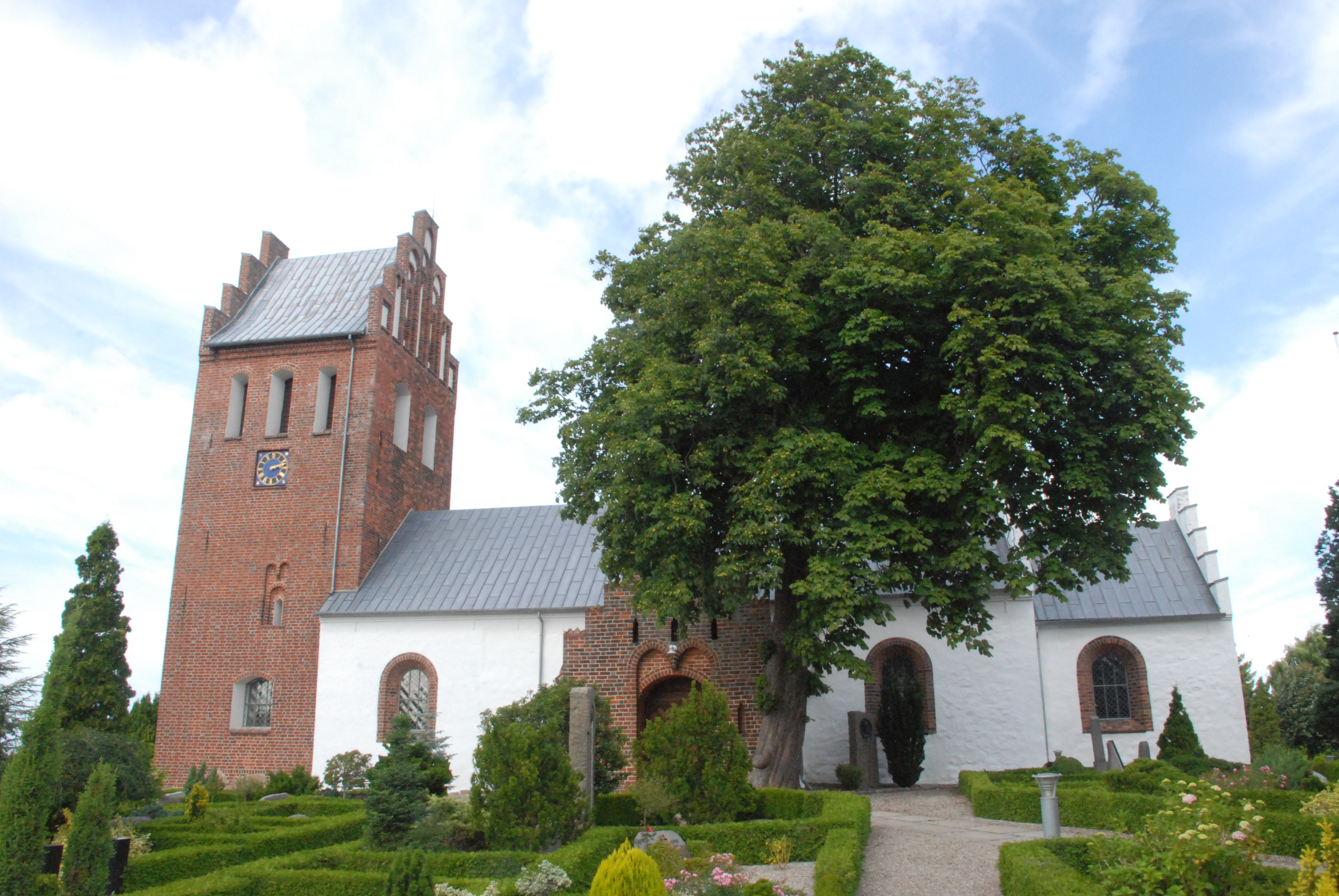 Græsted Kirke, Græsted Sogn, Holbo Herred, Frederiksborg Amt, Danmark.